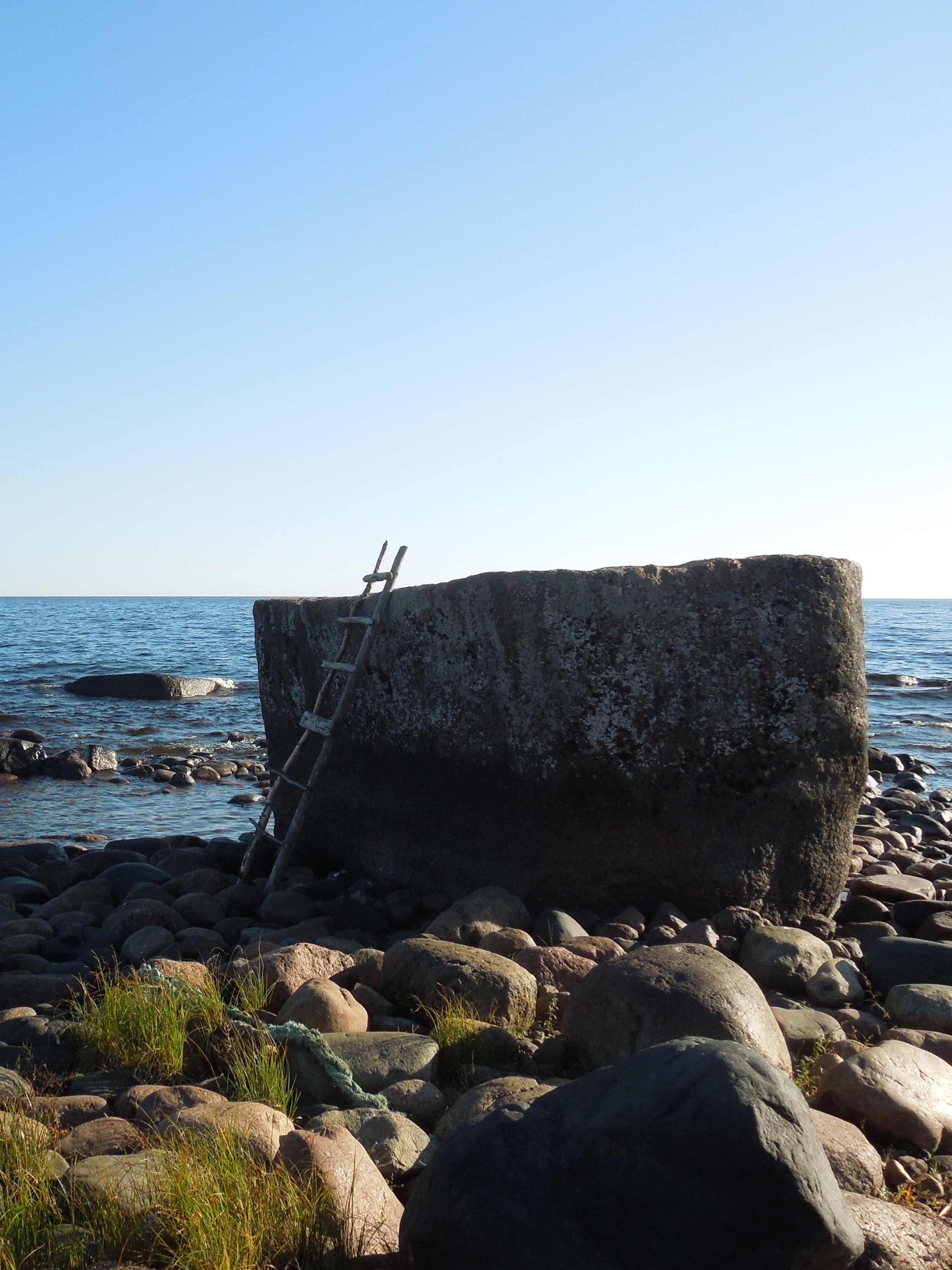 Знак пограничный ("Варашев камень"): мыс Варецкой на Ладожском о., Погранкондуши, Питкярантский район, Карелия